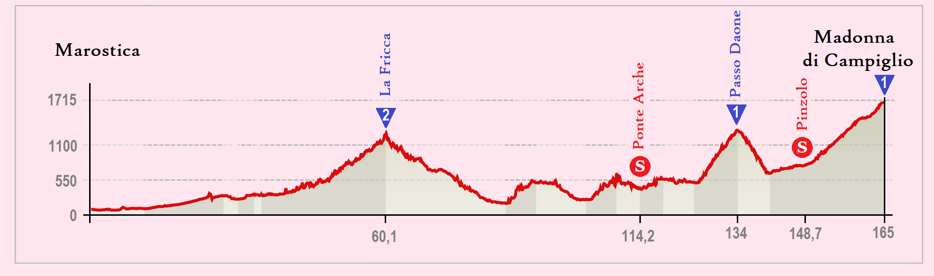 Perfil de la 15.ª etapa del Giro de Italia 2015